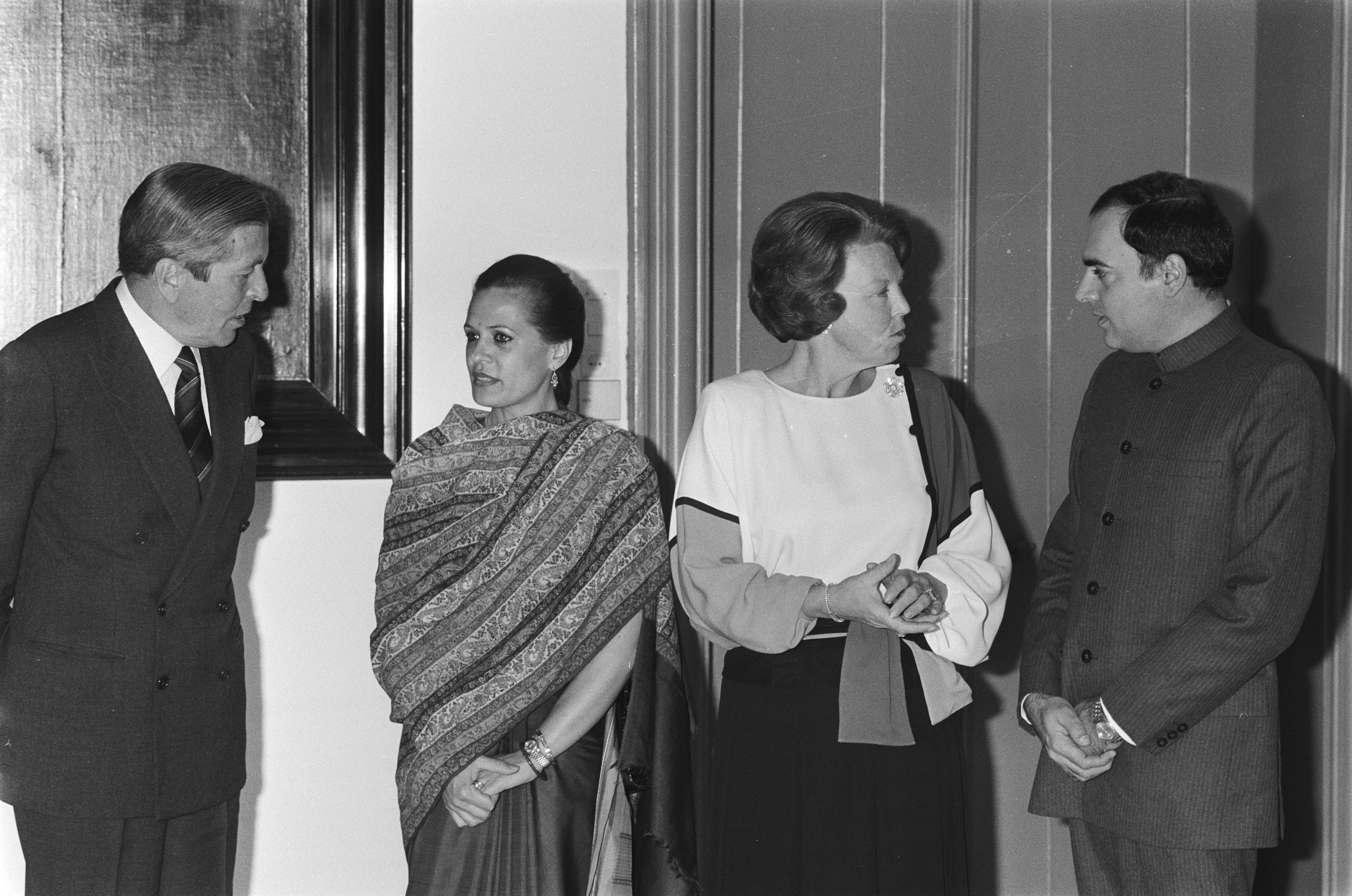 Collectie / Archief : Fotocollectie Anefo Reportage / Serie : [ onbekend ] Beschrijving : Bezoek premier Rajiv Gandhi van India; ontvangst op Paleis Huis ten Bosch; Prins Claus, mevrouw Gandhi, koningin Beatrix en premier Gandhi Datum : 25 oktober 1985 Locatie : Den Haag, Zuid-Holland Trefwoorden : Ontvangsten, bezoeken, koninginnen, premiers Persoonsnaam : Beatrix, koningin, Claus, prins, Gandhi, Rajiv Instellingsnaam : Paleis Huis ten Bosch Fotograaf : Croes, Rob C. / Anefo Auteursrechthebbende : Nationaal Archief Materiaalsoort : Negatief (zwart/wit) Nummer archiefinventaris : bekijk toegang 2.24.01.05 Bestanddeelnummer : 933-4642